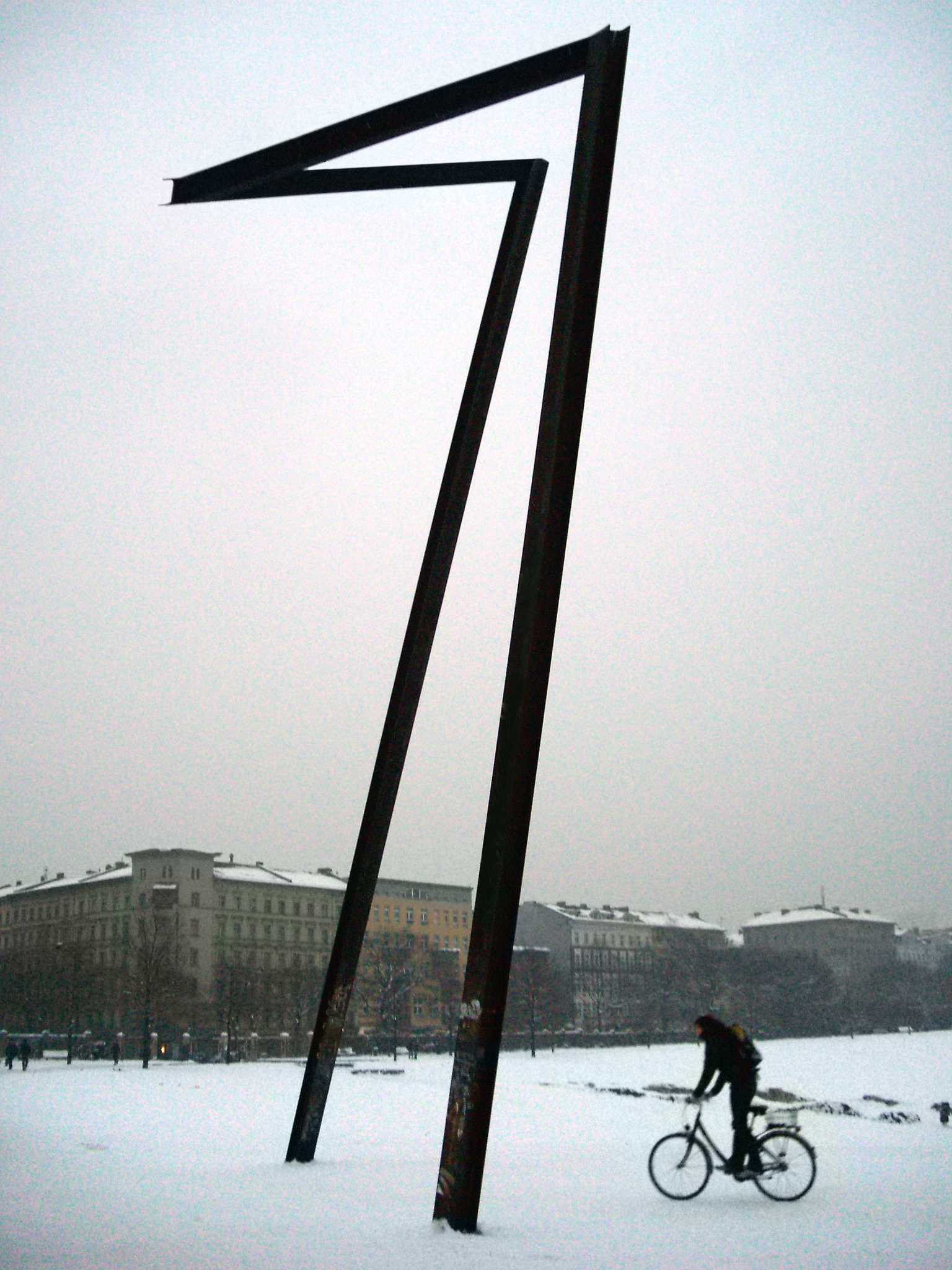 Rüdiger Preisler, Stahlskulptur "Schreitender Mensch", entstanden 1992, Höhe 14 Meter - Kunst im öffentlichen Raum: Görlitzer Park, Berlin-Kreuzberg